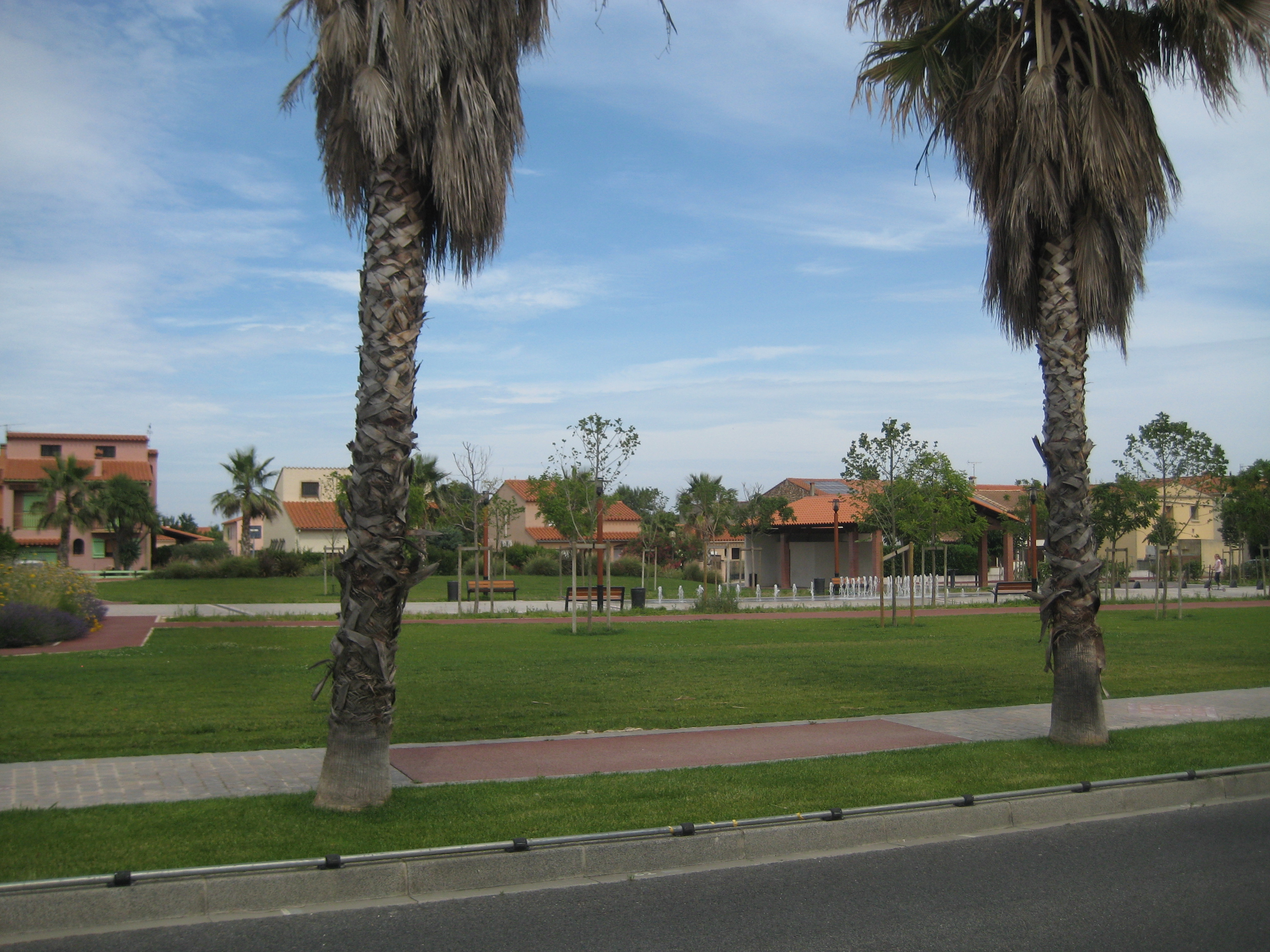 Plcae aménagée à Pollestres